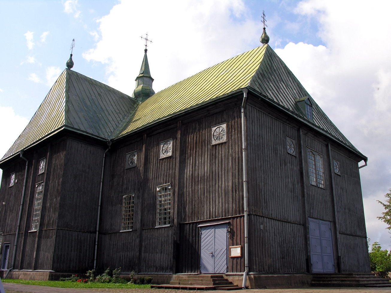 Seda, Mažeikių raj. Sedos Švč. Mergelės Marijos Ėmimo į dangų bažnyčia Foto: Algirdas, 2006 m. rugsėjo 2 d., Lietuva